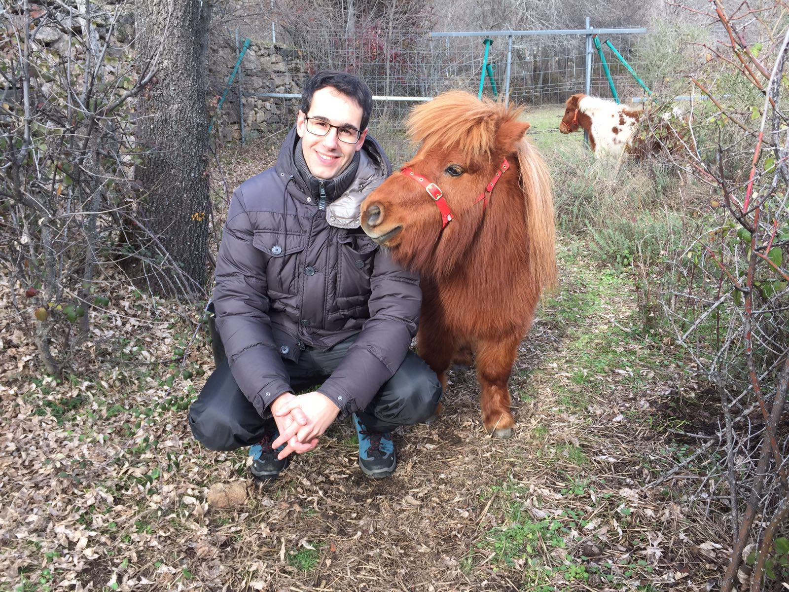 Dos ponis domesticados con su Xavi Puig